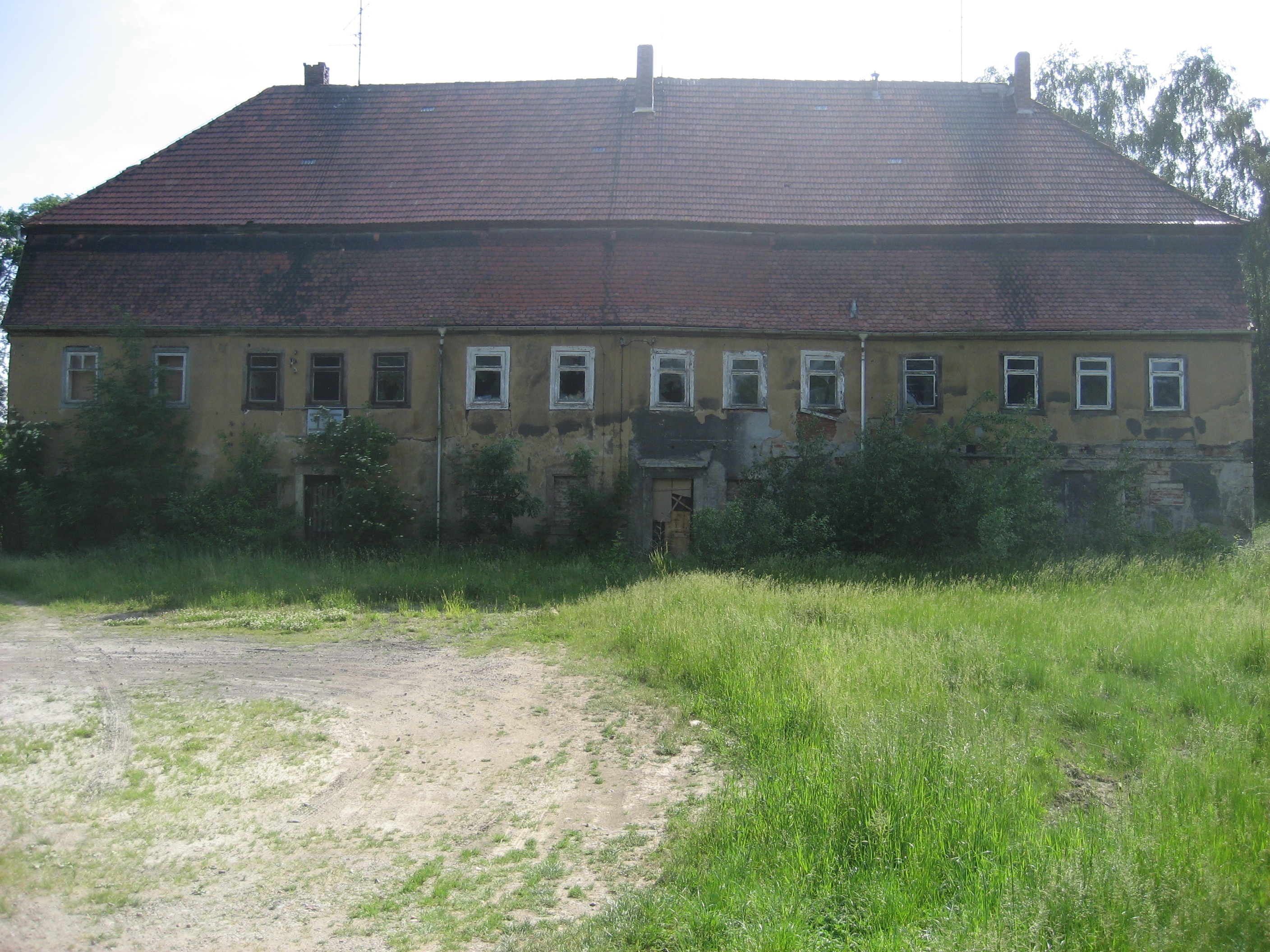 Ruine des ehemaligen Ritterguts Kändler